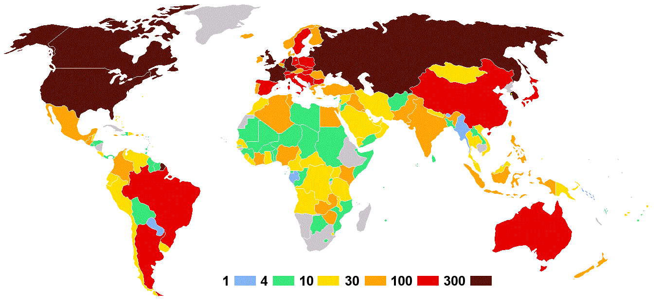 Olympische Sommerspiele 1988 — Anzahl der Athleten